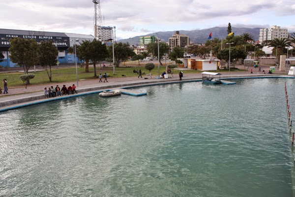 Laguna del parque